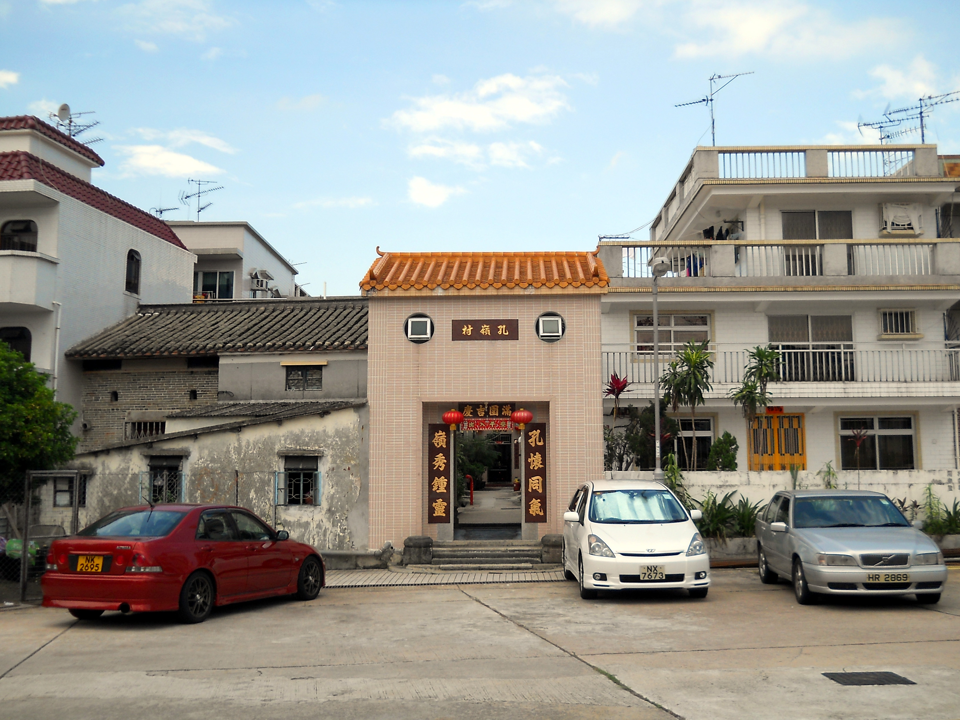 中文（香港）: 粉嶺孔嶺